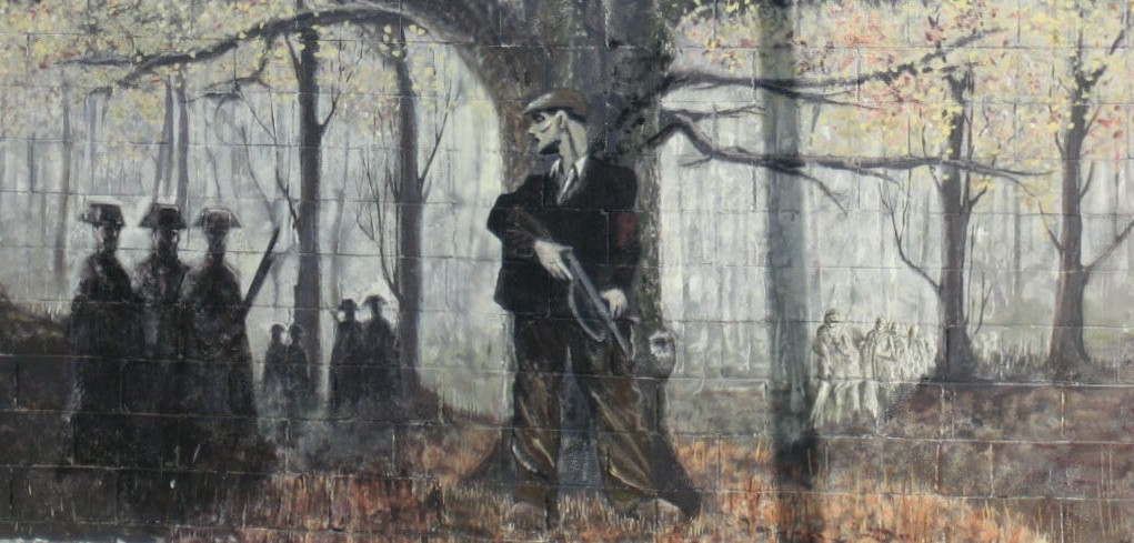 Fotografia d'un graffiti sobre maquis que vaig fer a Sallent (Barcelona)